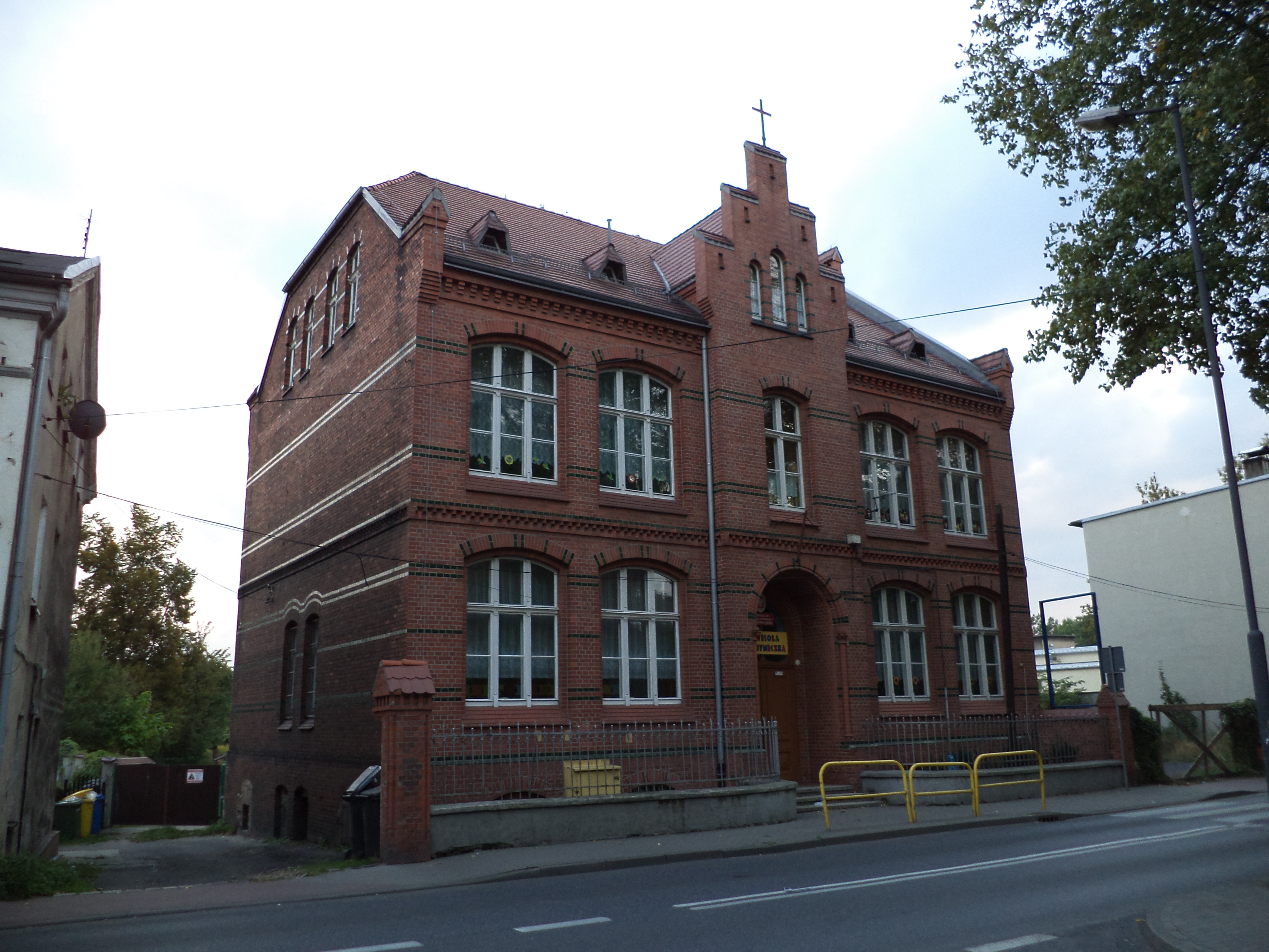 Budynek przedszkola publicznego nr 1 "Wesoła Jedyneczka" w Tarnowskich Górach. Dawny Dom Św. Katarzyny (Katarinaheim) - miejska średnia szkoła żeńska